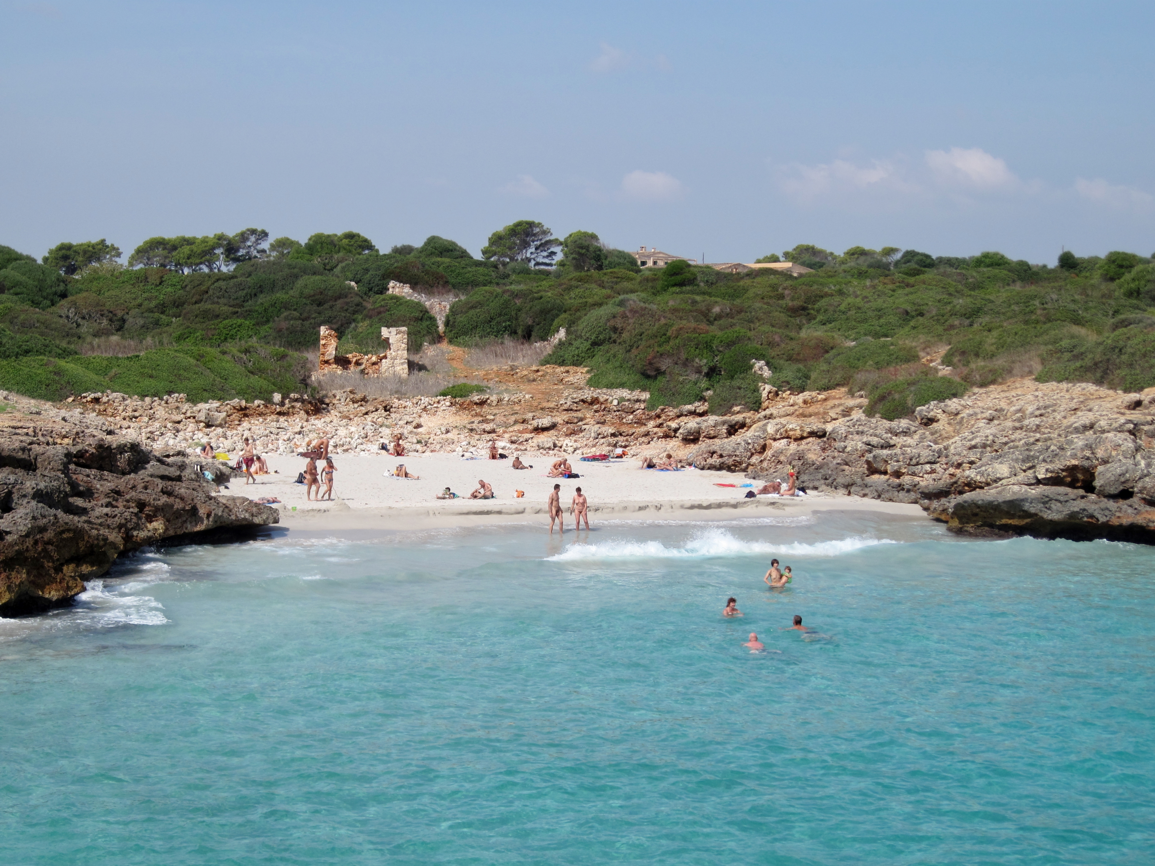 Caló d’en Rafalino, Nebenbucht der Cala Morlanda, Gemeinde Manacor, Mallorca, Spanien